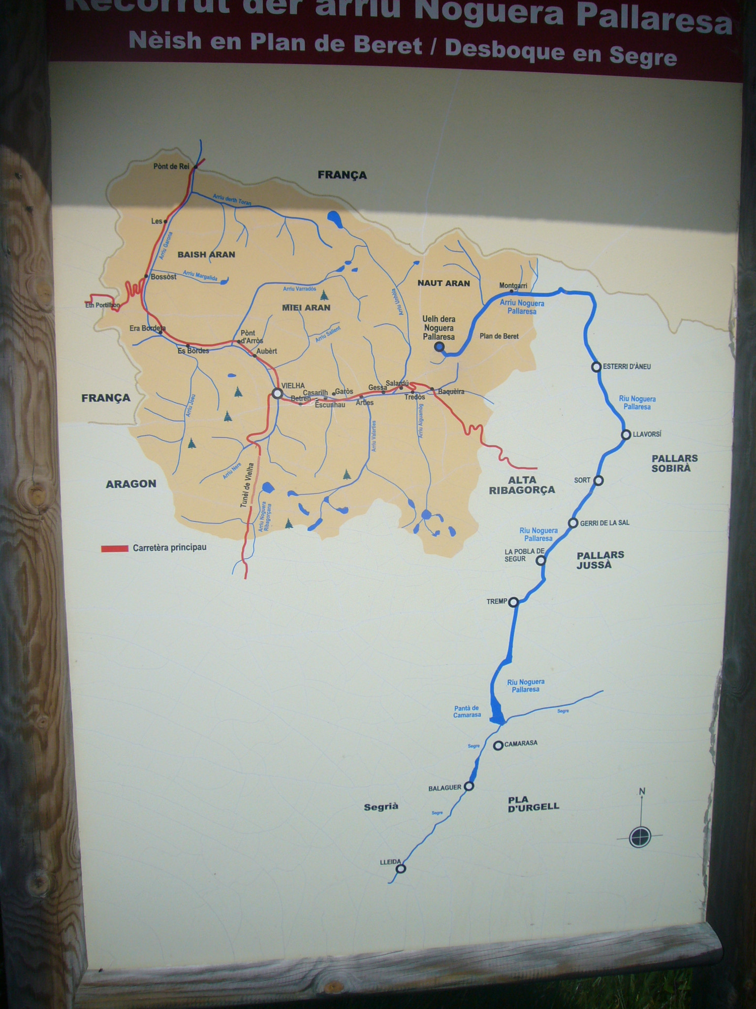 Placa prop del naixement del Noguera Pallaresa - al Pla de Beret. També mostra els afluents del Garona a la Vall d'Aran